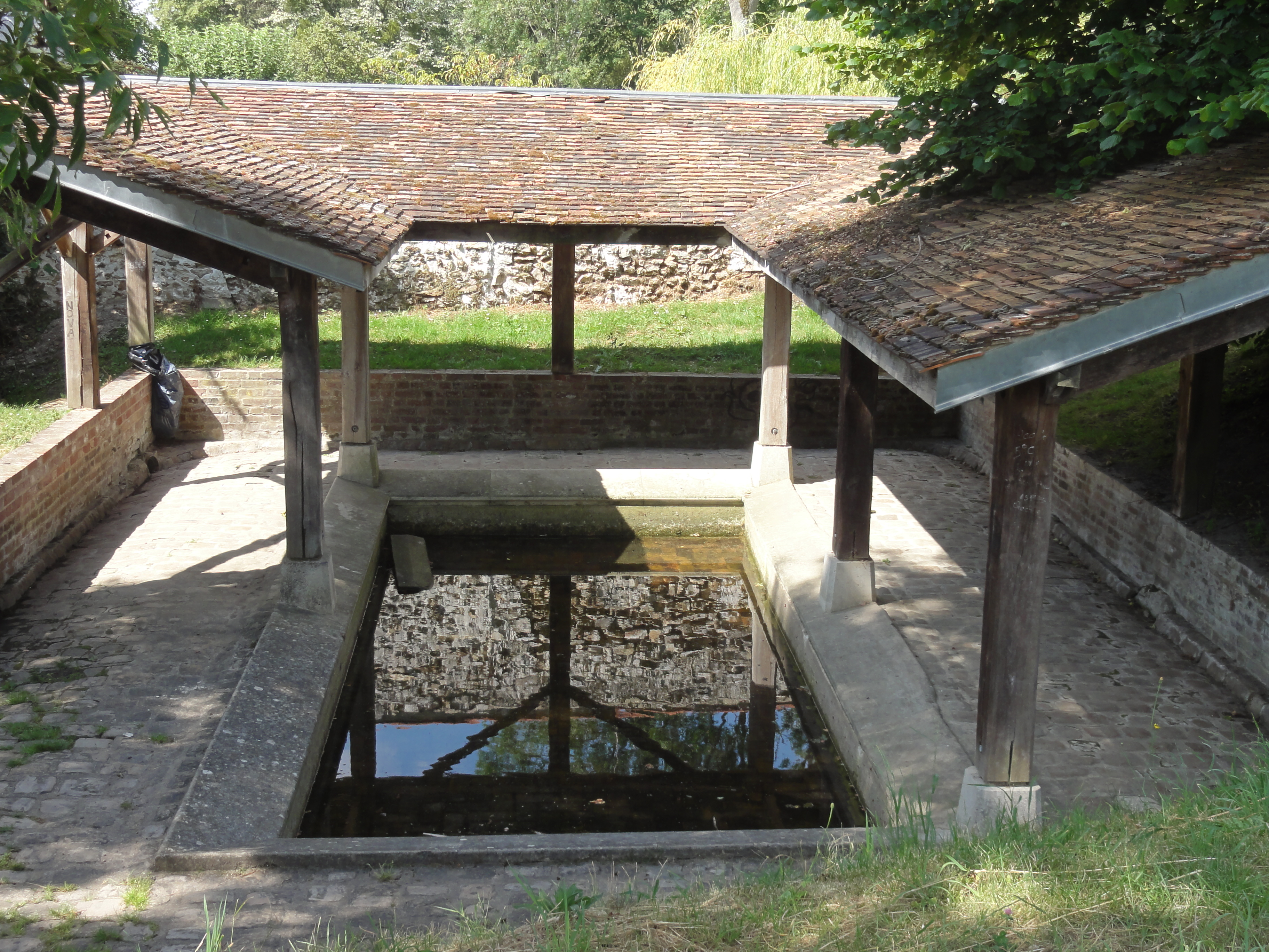 Voir titre.